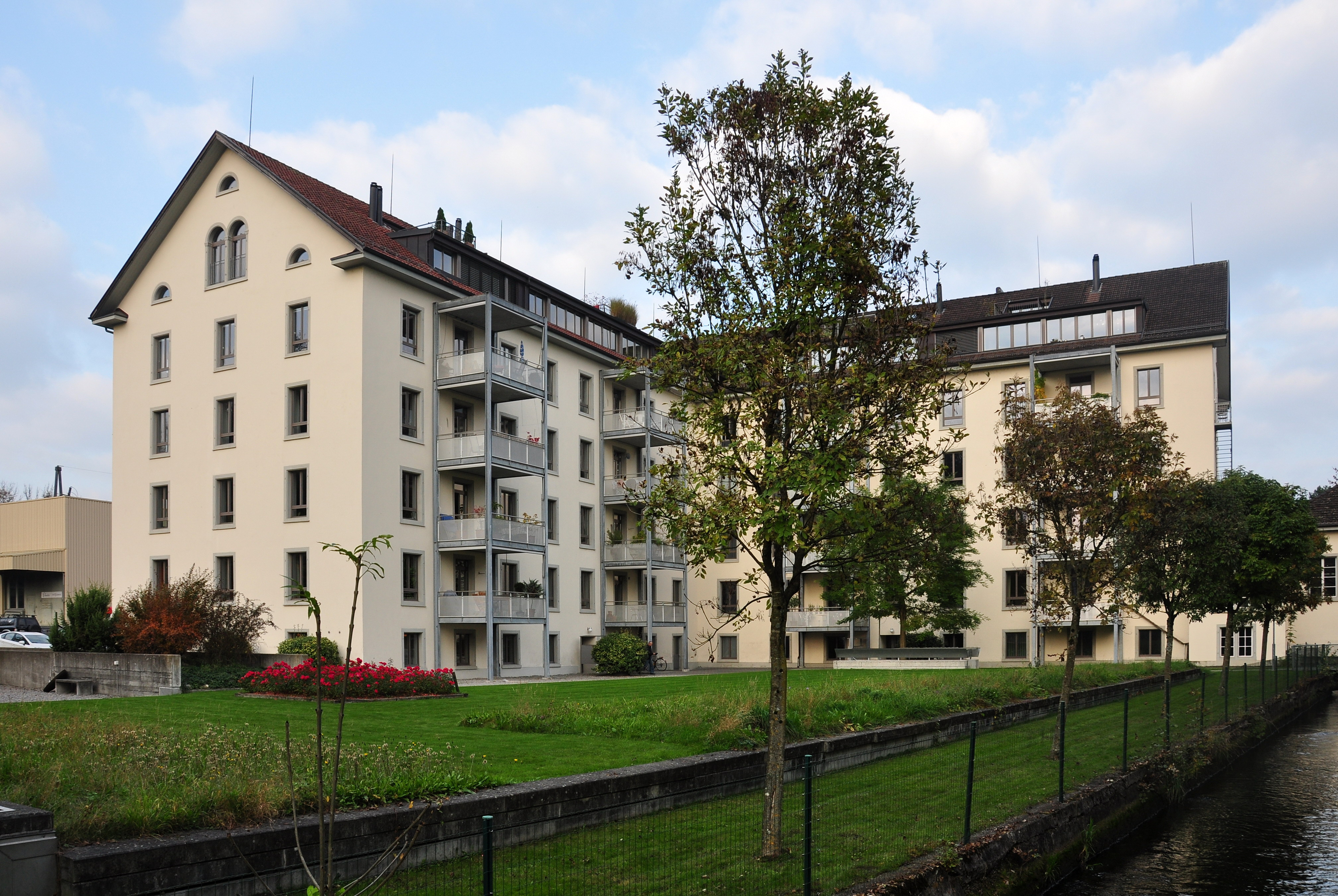 Stadtbach stream and former Spinnerei Brändli buildings in Jona (Switzerland)